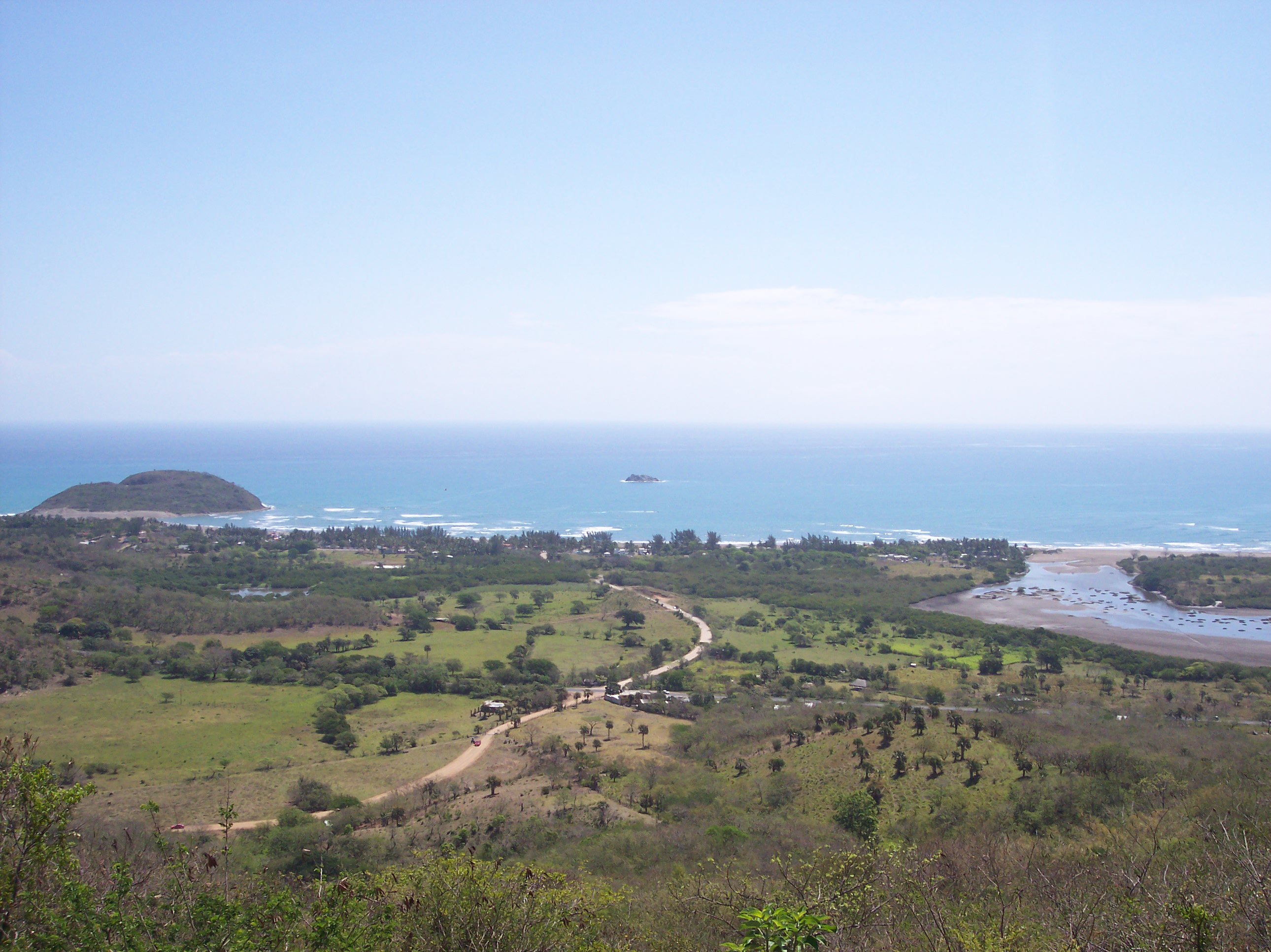 In this beach Hernán Cortèz landed to America in 1519. Photograph from Quiahuztlan. SPANISH: En esta playa Hernán Cortez desembarcó en América. Fotografía desde Quiahuztlan. Note: Details about the photo are pending. Archeological Site Quiahuiztlan. Located in the Actopan Municipality, Estate of Veracruz, Mexico. SPANISH: Sitio Arqueológico Quiahuiztlán, Localizado en el Municipio de Actopan, Estado de Veracruz, México.